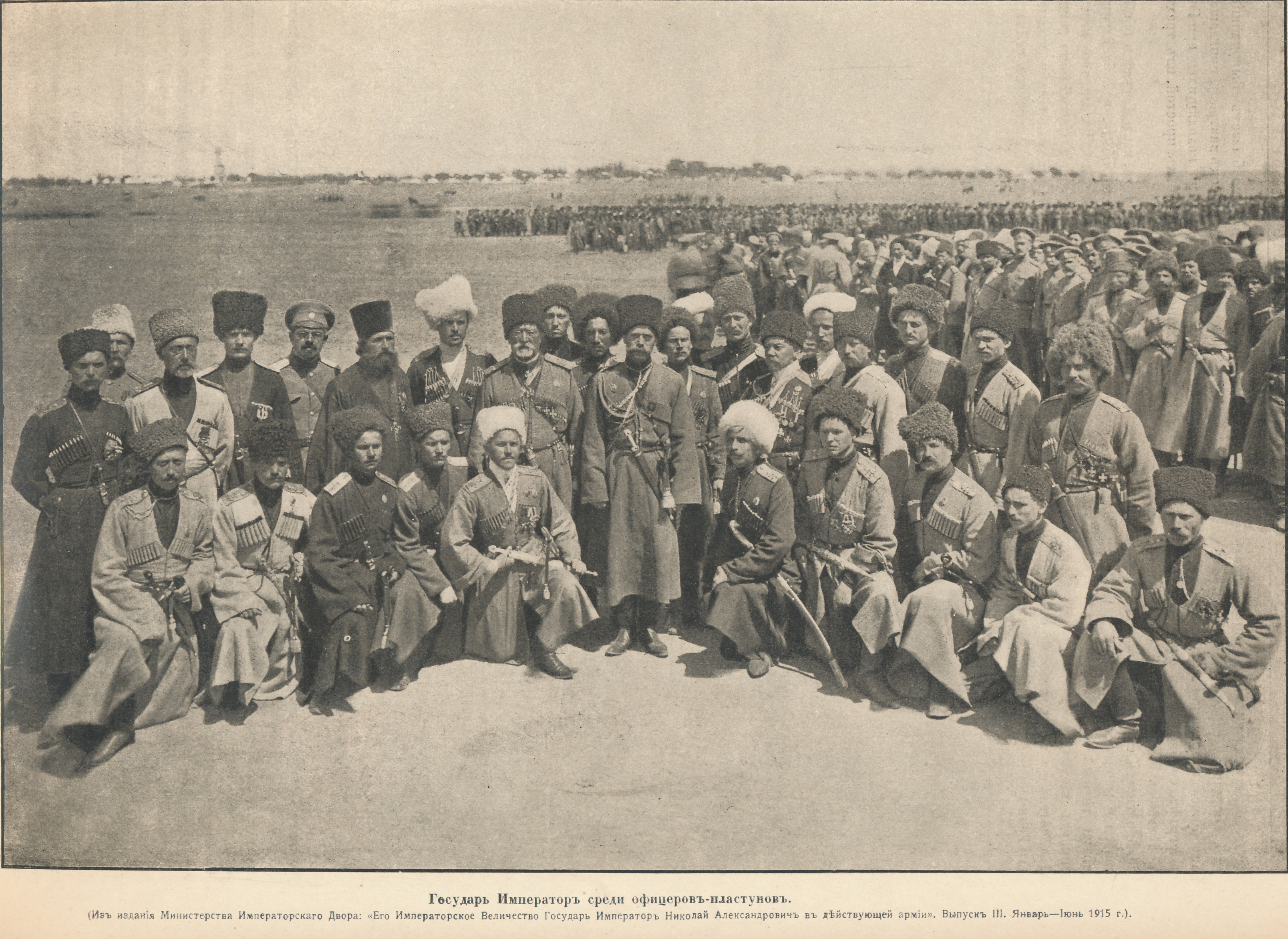 Николай II среди офицеров-пластунов, Журнал "Летопись войны", 1915, № 61, с. 977.